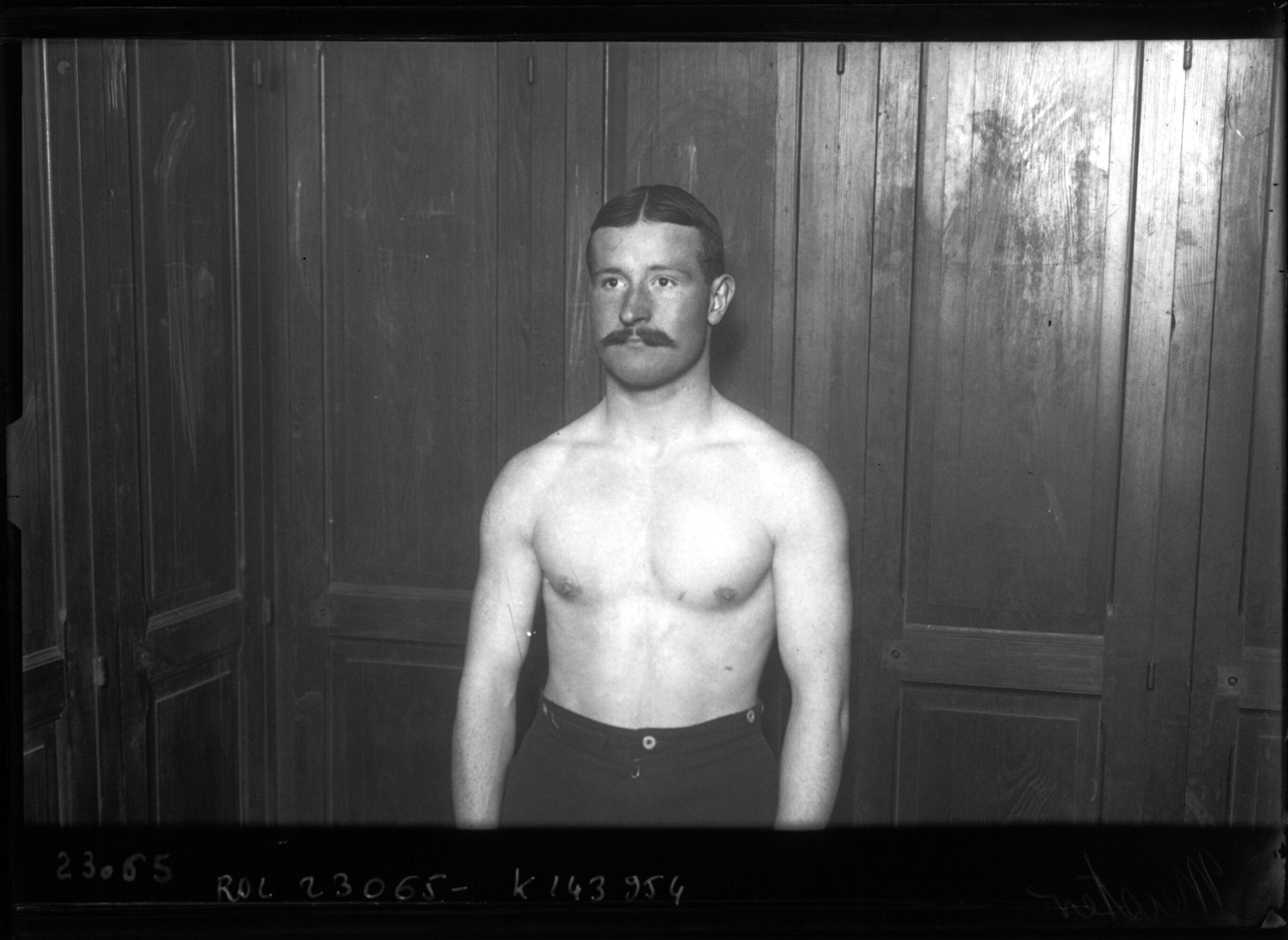 Meister [portrait du nageur] : [photographie de presse] / [Agence Rol]